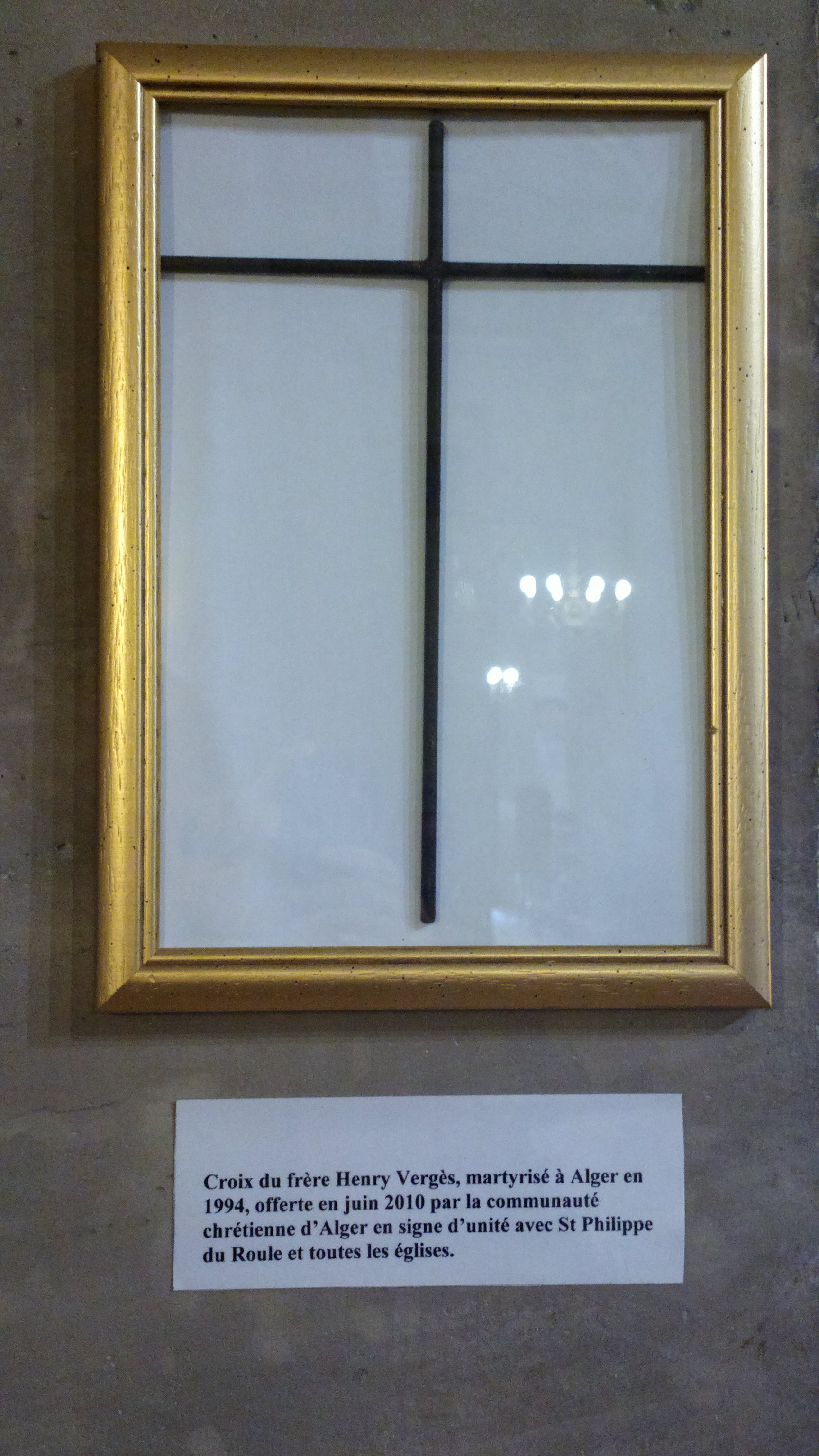 L’église Saint-Philippe-du-Roule se trouve 154 rue du Faubourg-Saint-Honoré, dans le 8ème arrondissement de Paris. Henri Vergès, né le 15 juillet 1930 dans les Pyrénées-Orientales et mort assassiné à Alger le 8 mai 1994, est un religieux enseignant français, religieux mariste, qui fait partie des dix-neuf martyrs de l'Algérie de 1994 à 1996. .